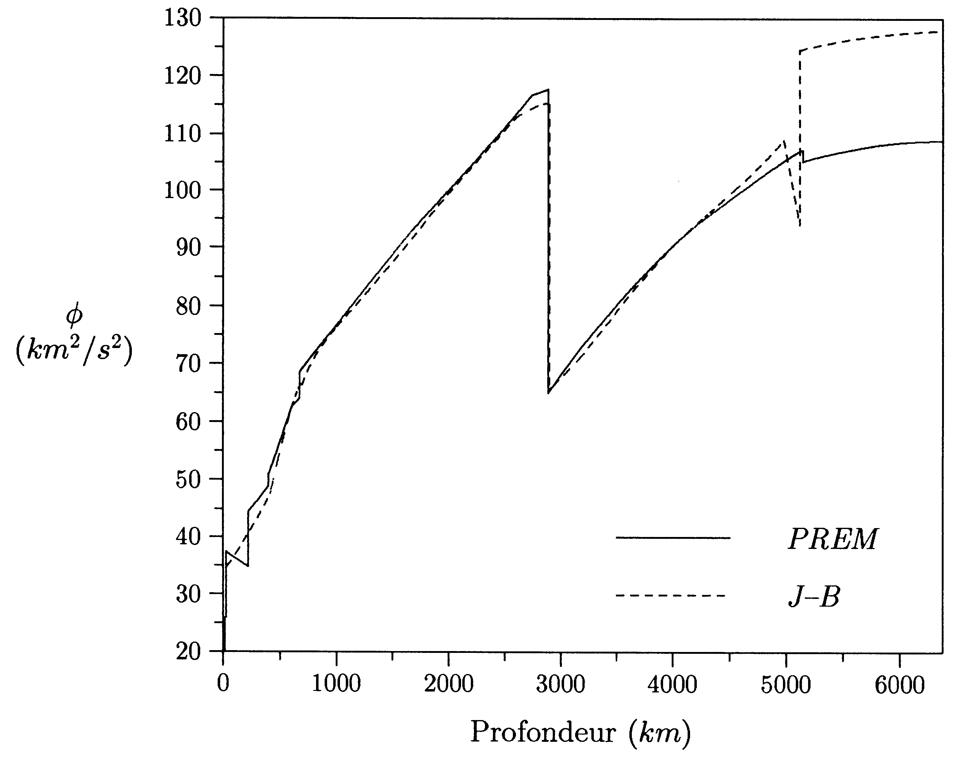 Paramètre sismologique pour les modèles de Jeffreys-Bullen et PREM.